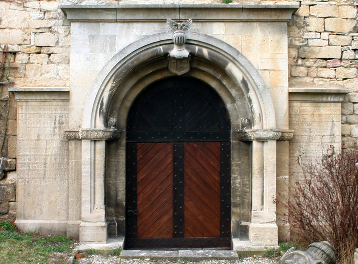 Gruft an der Klosterkirche auf Gut Zscheiplitz